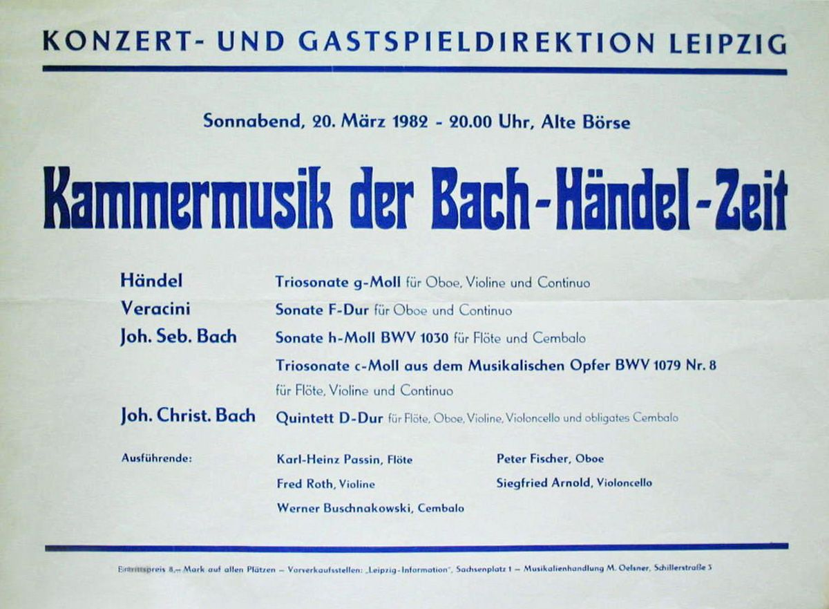 Plakat für ein Konzert der Reihe Kammermusik der Bach-Händel-Zeit